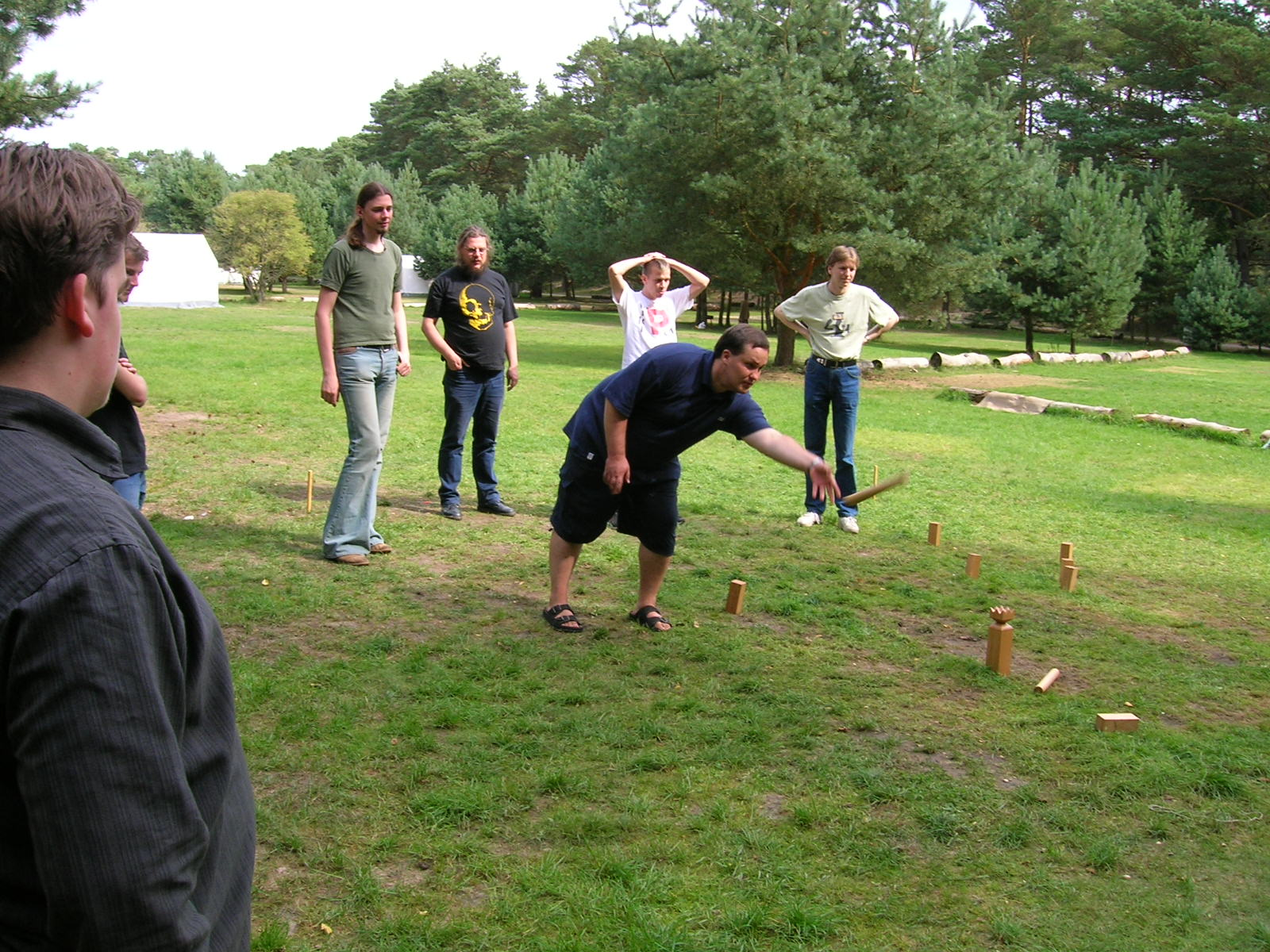 Wikipedia-Treffen Usedom 2005